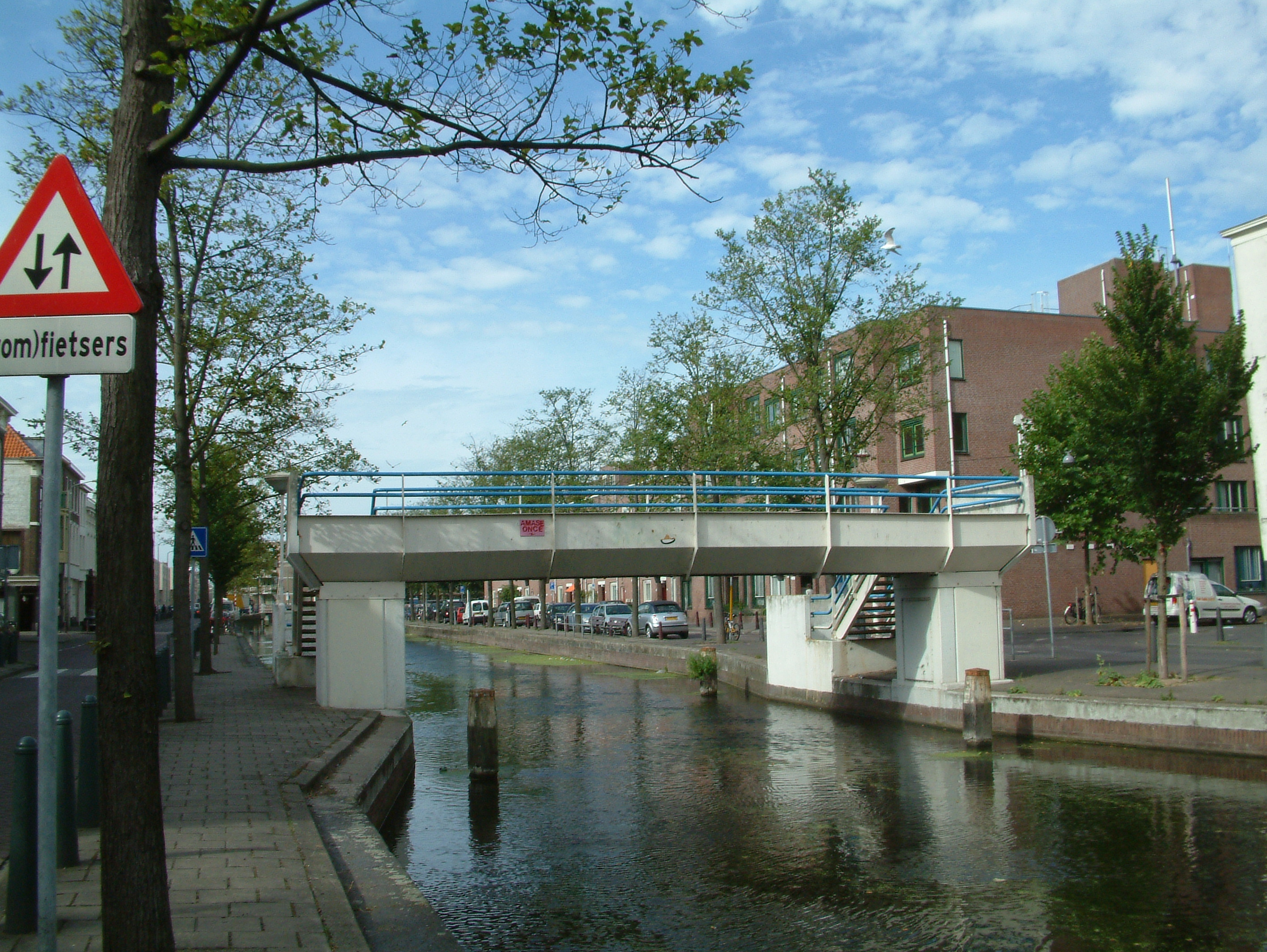 Brug in Den Haag